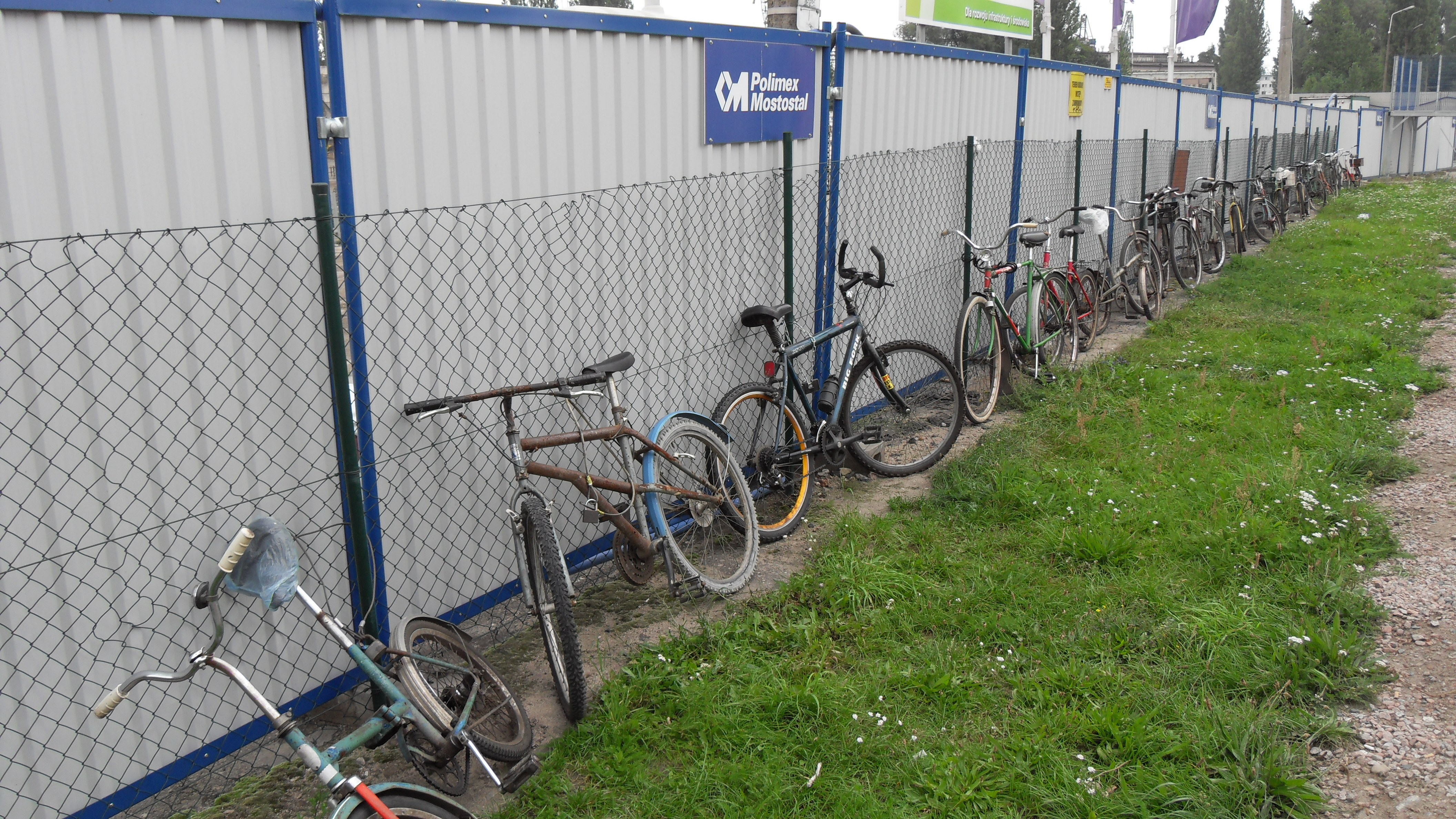 Stocznia Gdańska. Rowery stoczniowców, służące do poruszania się po rozległym terenie stoczni.